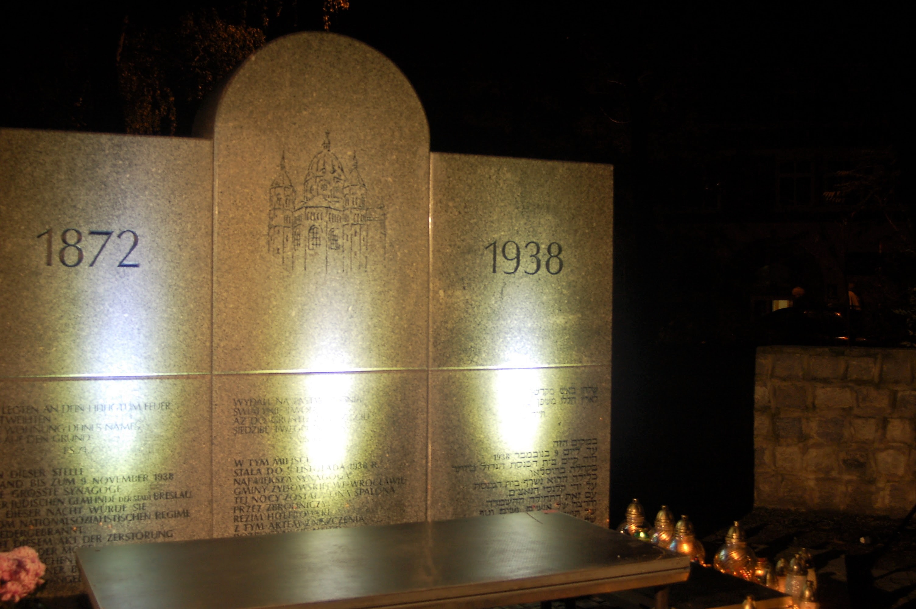 התמונה צולמה על ידי בעז פכלר, בצעדה לזכר אירועי ליל הבדולח שהתקיימה בעיר (והועלתה באישורו)